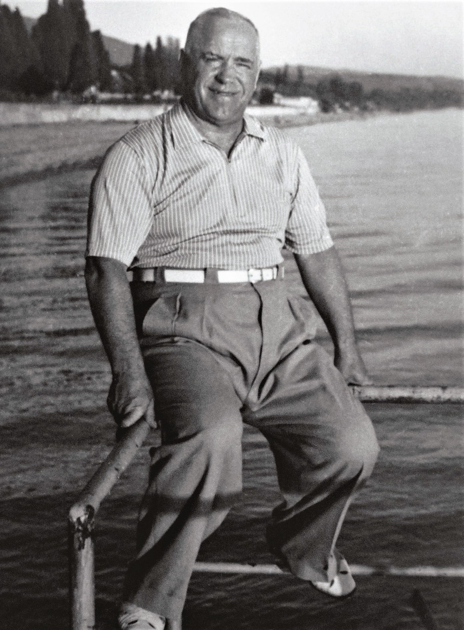 Георгий Константинович Жуков на отдыхе в Сочи